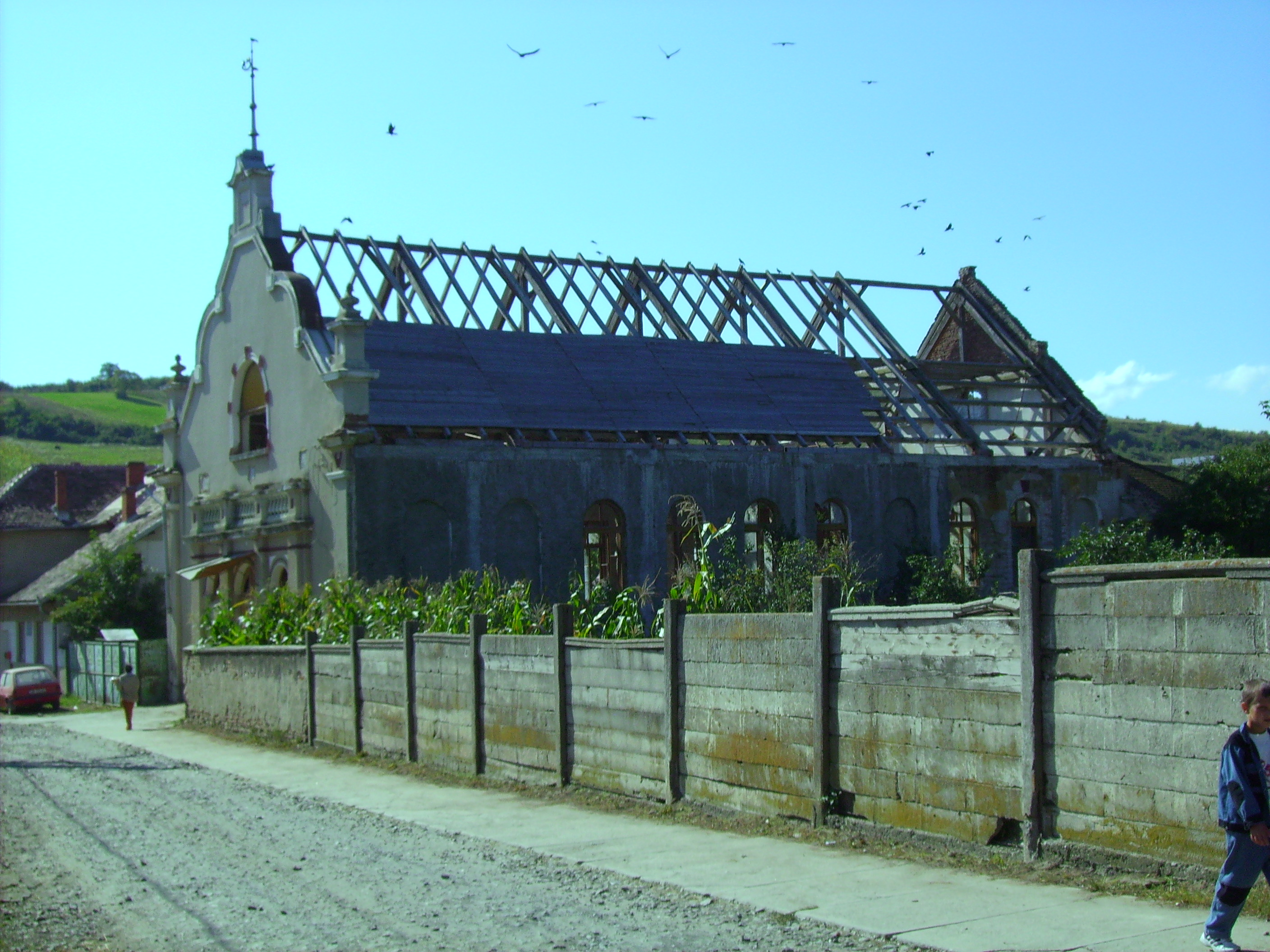 alter Gemeindesaal in Großscheuern